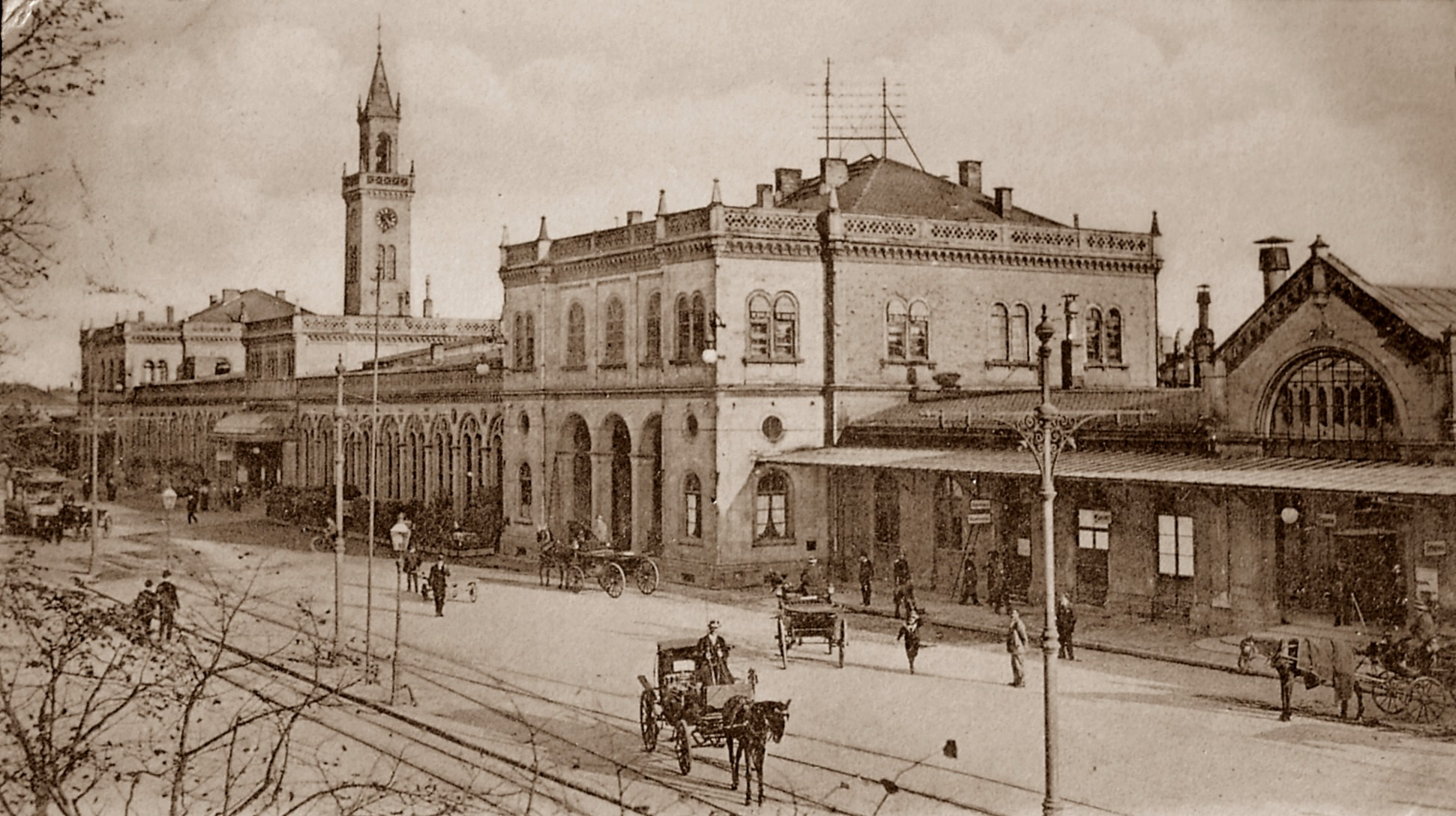 Der von Friedrich Eisenlohr entworfene und 1843 eröffnete Bahnhof an der Kriegstraße. Die Aufnahme zeigt nicht mehr den ursprünglichen Zustand des Bahnhofs, wie ihn Eisenlohr ursprünglich entworfen hatte: Zur Straßenseite hin war der Bahnhof vergrößert worden wie auch in der Aufnahme gut durch die hellere Farbe der zur Erweiterung verwendeten Steine erkennbar ist. Dadurch sind auch die ursprünglich im Mittelteil befindlichen Arkaden nicht mehr sichtbar. Der gesamte Nordteil des Bahnhofs zur Straße bildete nach der Erweiterung eine geschlossene Baufront.